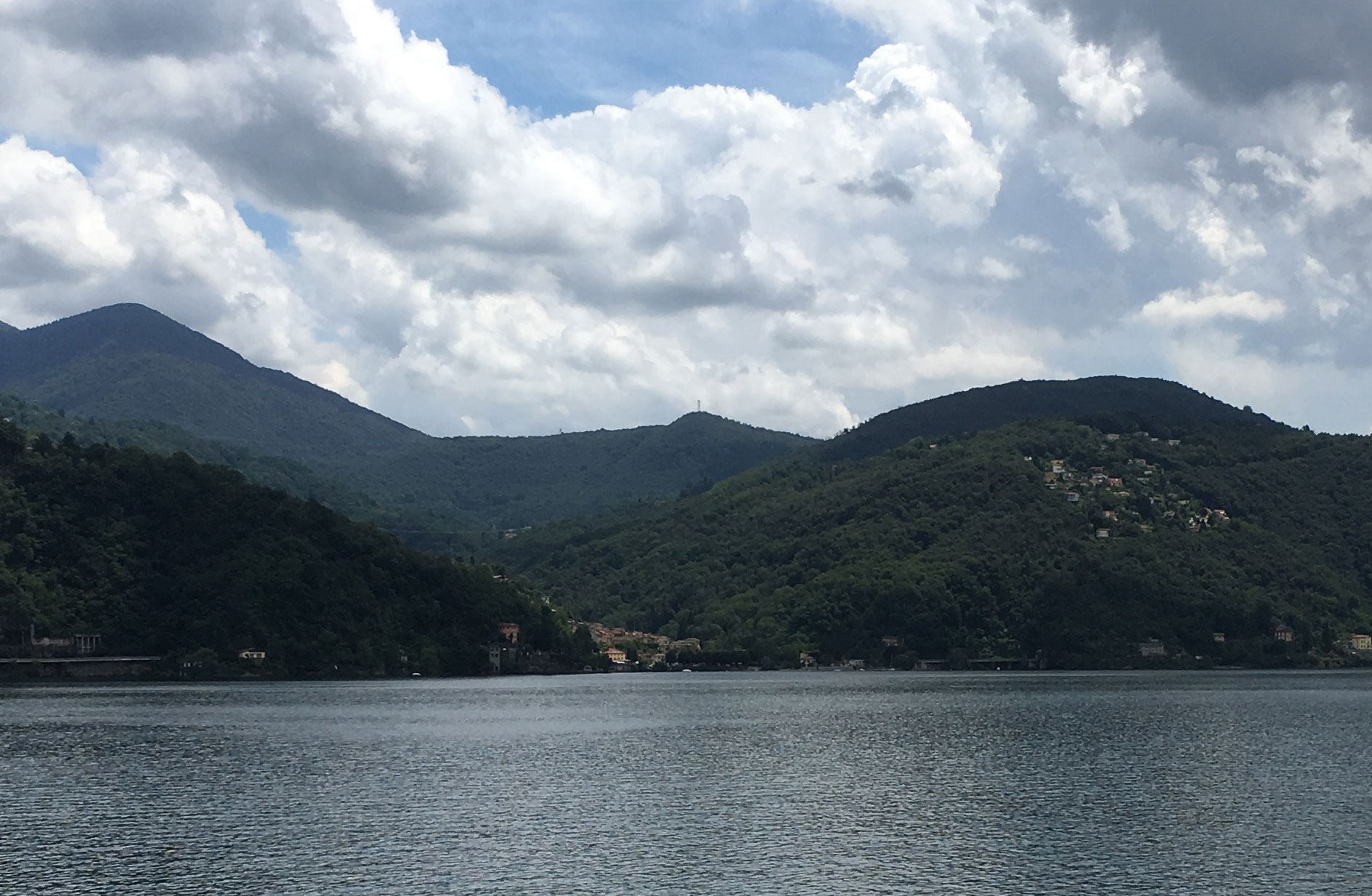 Blick vom Lago Maggiore. In der Mitte am Ufer das Dorf Colmegna, rechts auf dem Hügel das Dorf Il Gaggio, links am Horizont der Monte Rogoria, in der Bildmitte am Horizont (mit Freileitungsmast) der Monte Clivio und rechts am Horizon der Monte Bedea.